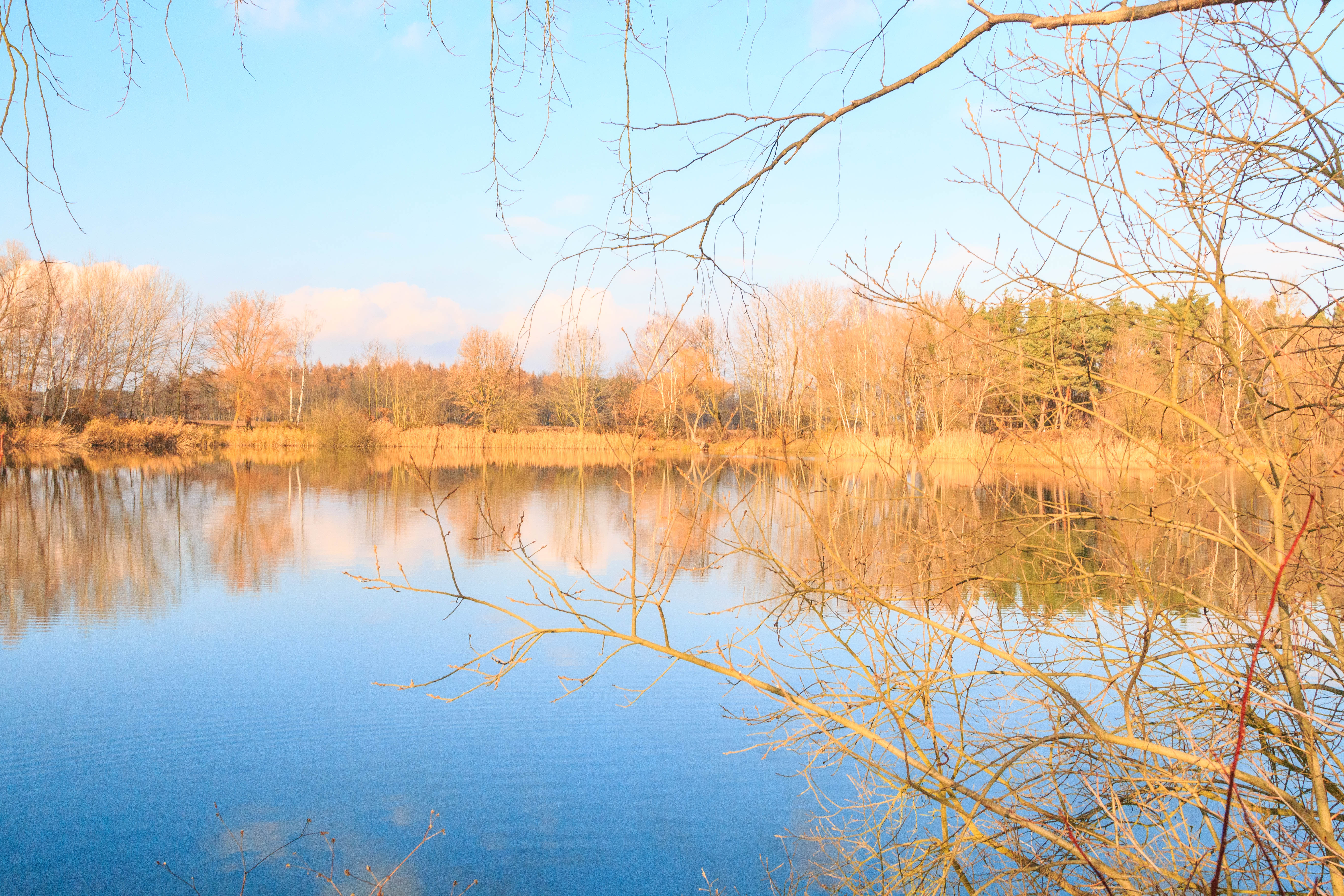 písník Malá Černá Project: Vodstvo.